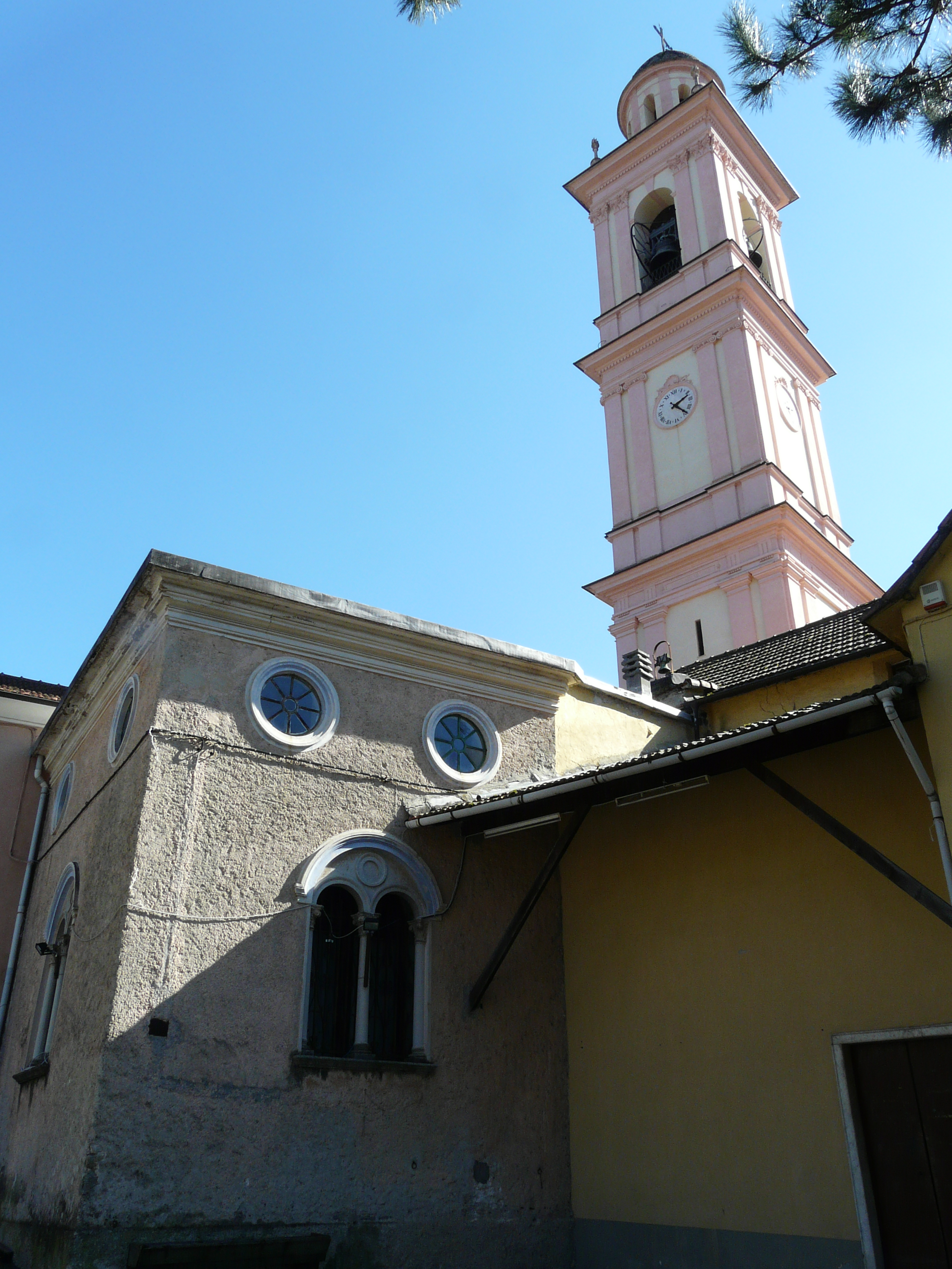 Chiesa di Sant'Ambrogio, Traso, Bargagli, Liguria, Italia